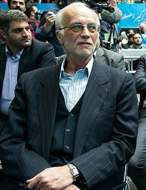 هاشمزائی در همایش انتخاباتی اصلاحطلبان، اسفند ۱۳۹۴